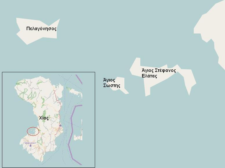 Άγιος Στέφανος Ελάτας This map may be incomplete, and may contain errors. Don't rely solely on it for navigation.